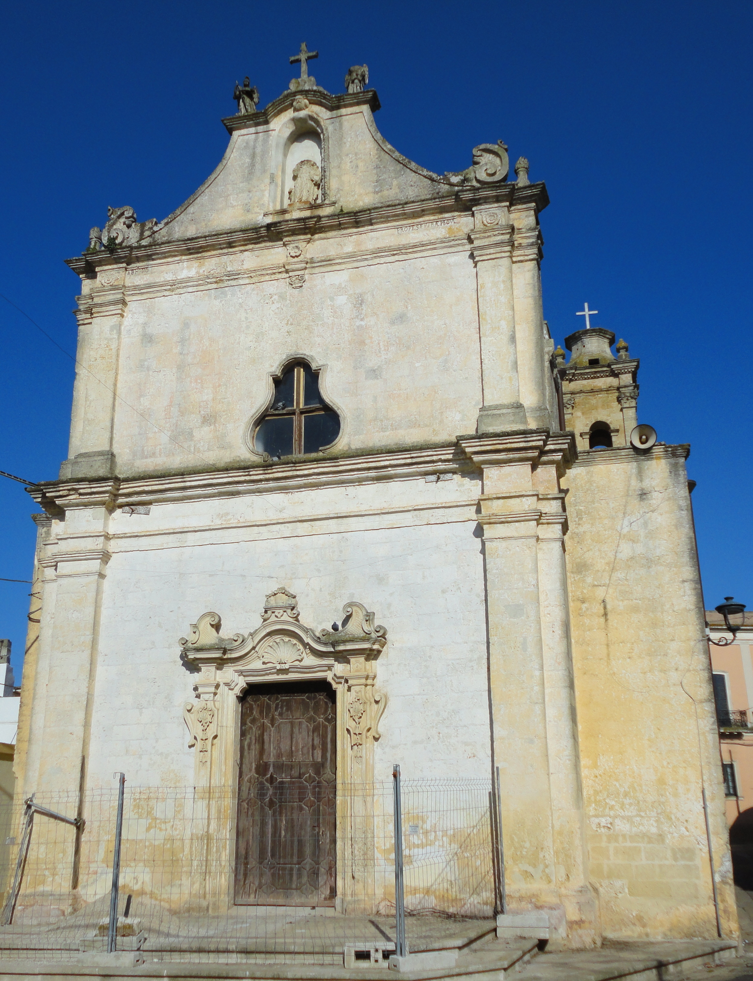 Chiesa di Sant'Ippazio Tiggiano, Lecce